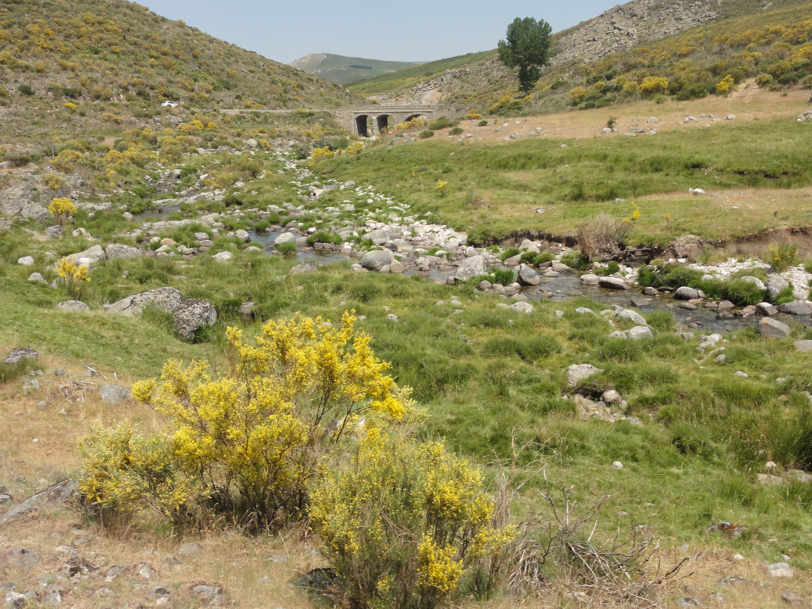 Puente romano cerca de Hoyos del Espino en la Sierra de Gredos This is a photography of a Site of Community Importance in Spain with the ID: ES4110002. Natura2000 entry, EEA entry